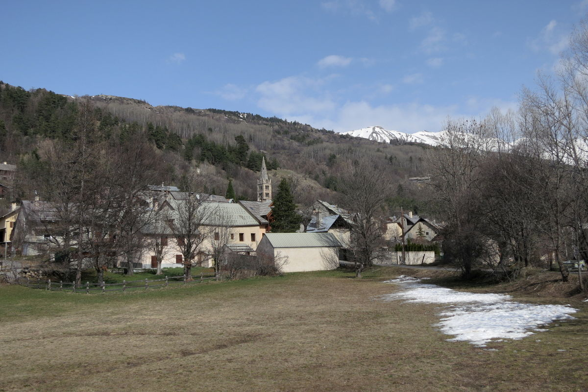 Village de La Salle (commune de La Salle-les-Alpes, Hautes-Alpes, France)